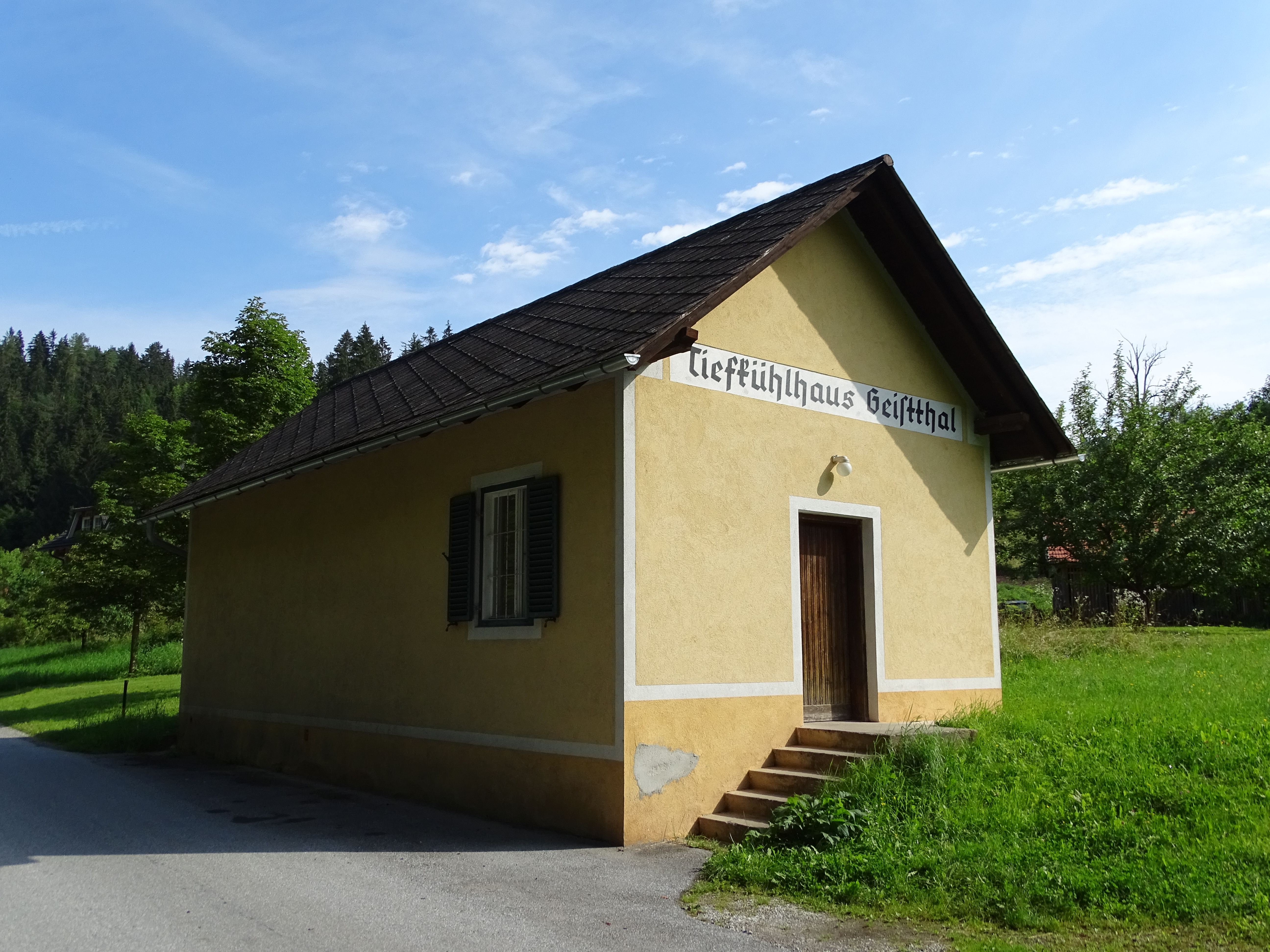 Das Tiefkühlhaus in Geistthal in der Gemeinde Geistthal-Södingberg